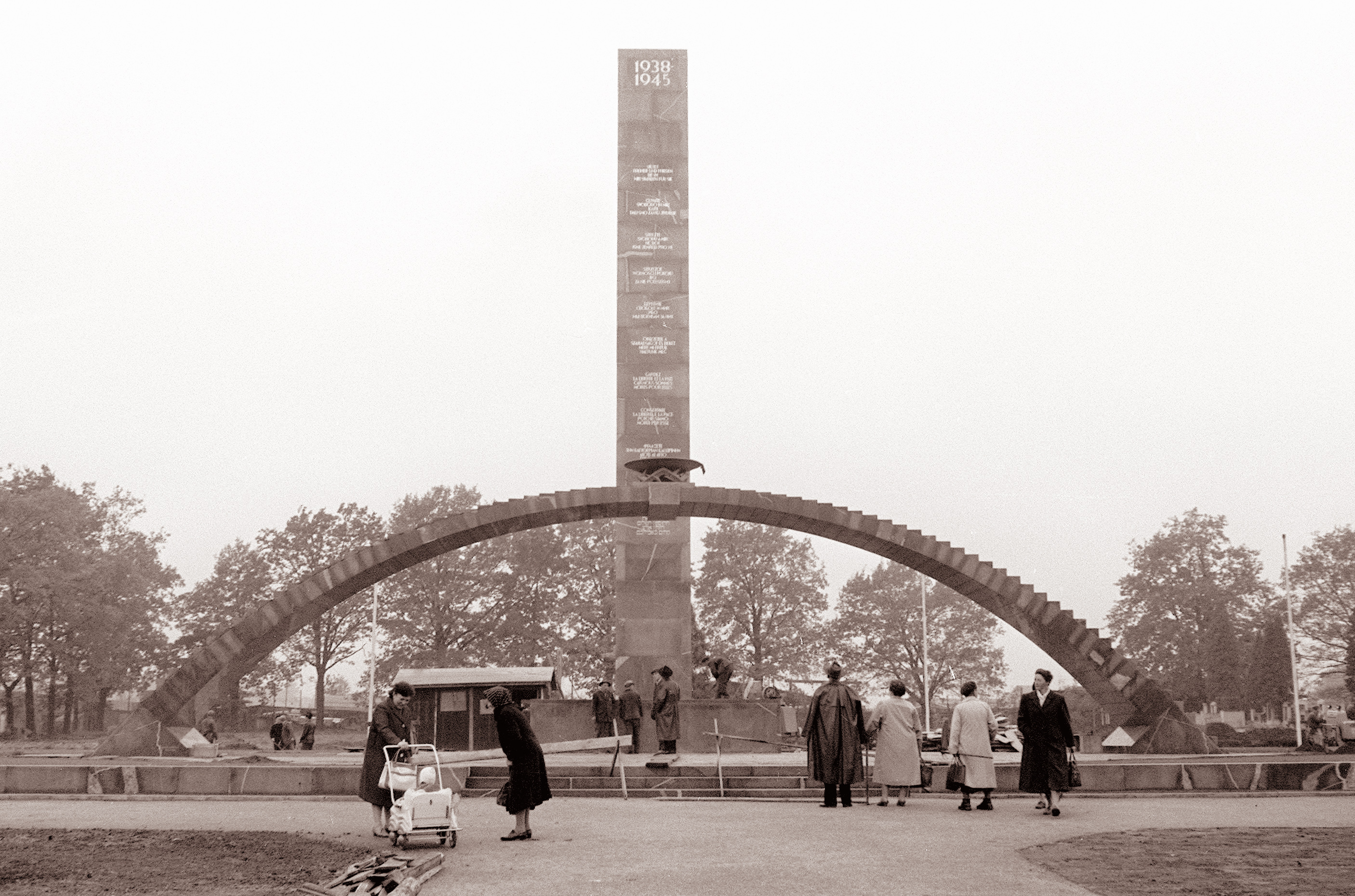 Spomenik Borisa Kobeta v Gradcu